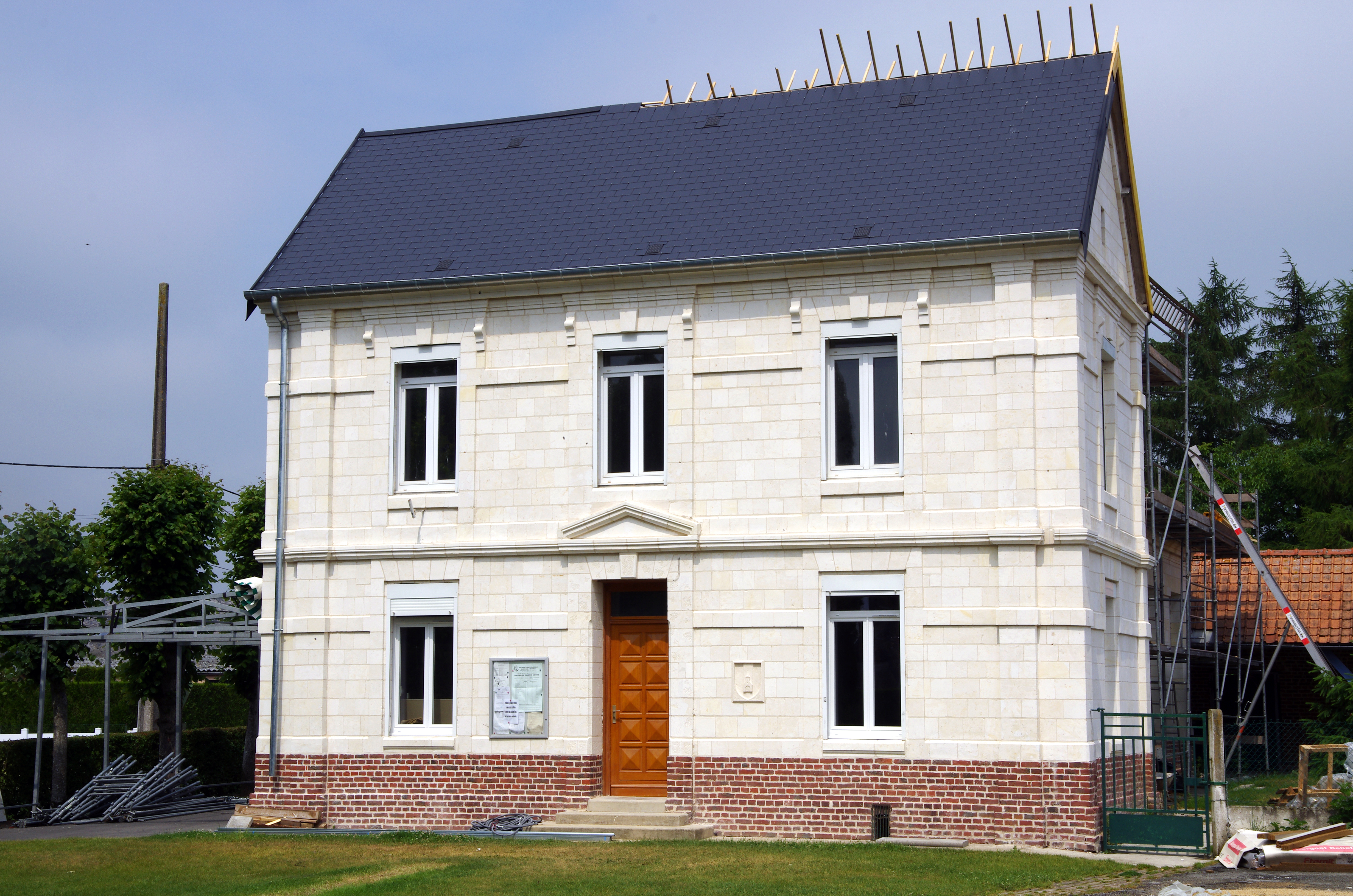 La Cauchie (Pas-de-Calais, France) - La mairie, dont le toit est en cours de réfection en juin 2011. .